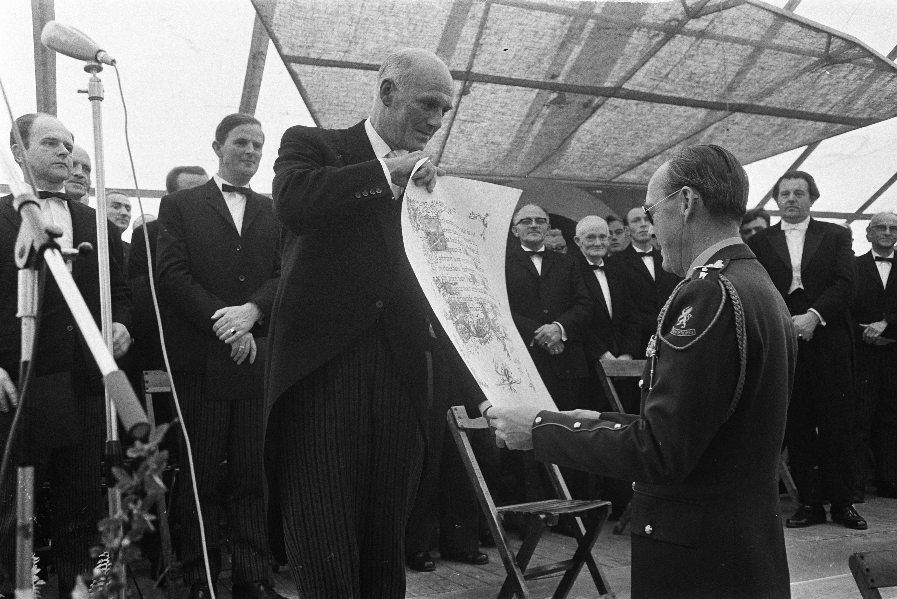 Aijolt Kloosterboer reikt in 1968 een document uit aan Prins Bernhard bij de herdenking van de Slag bij Heiligerlee.